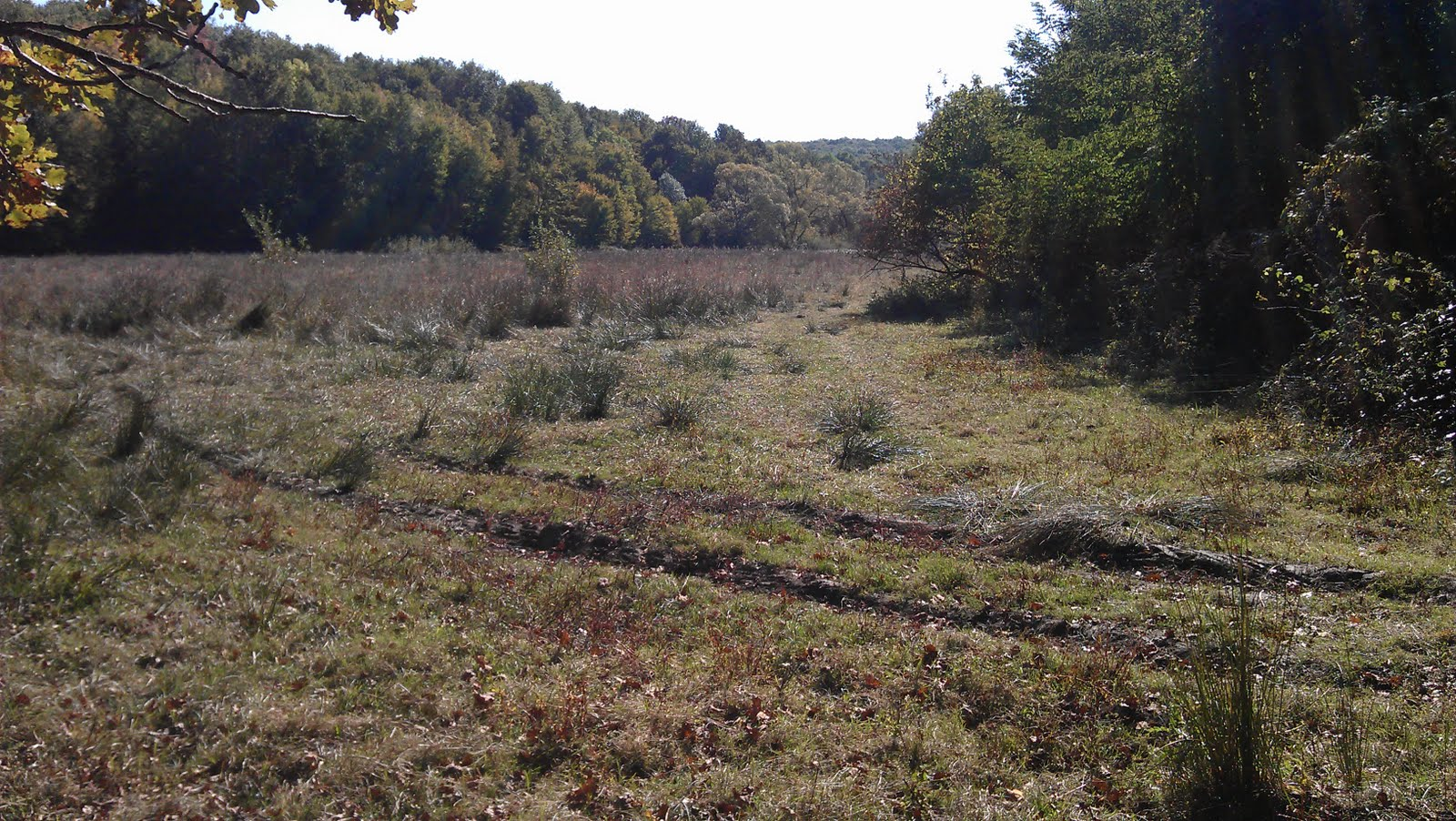 Benačić